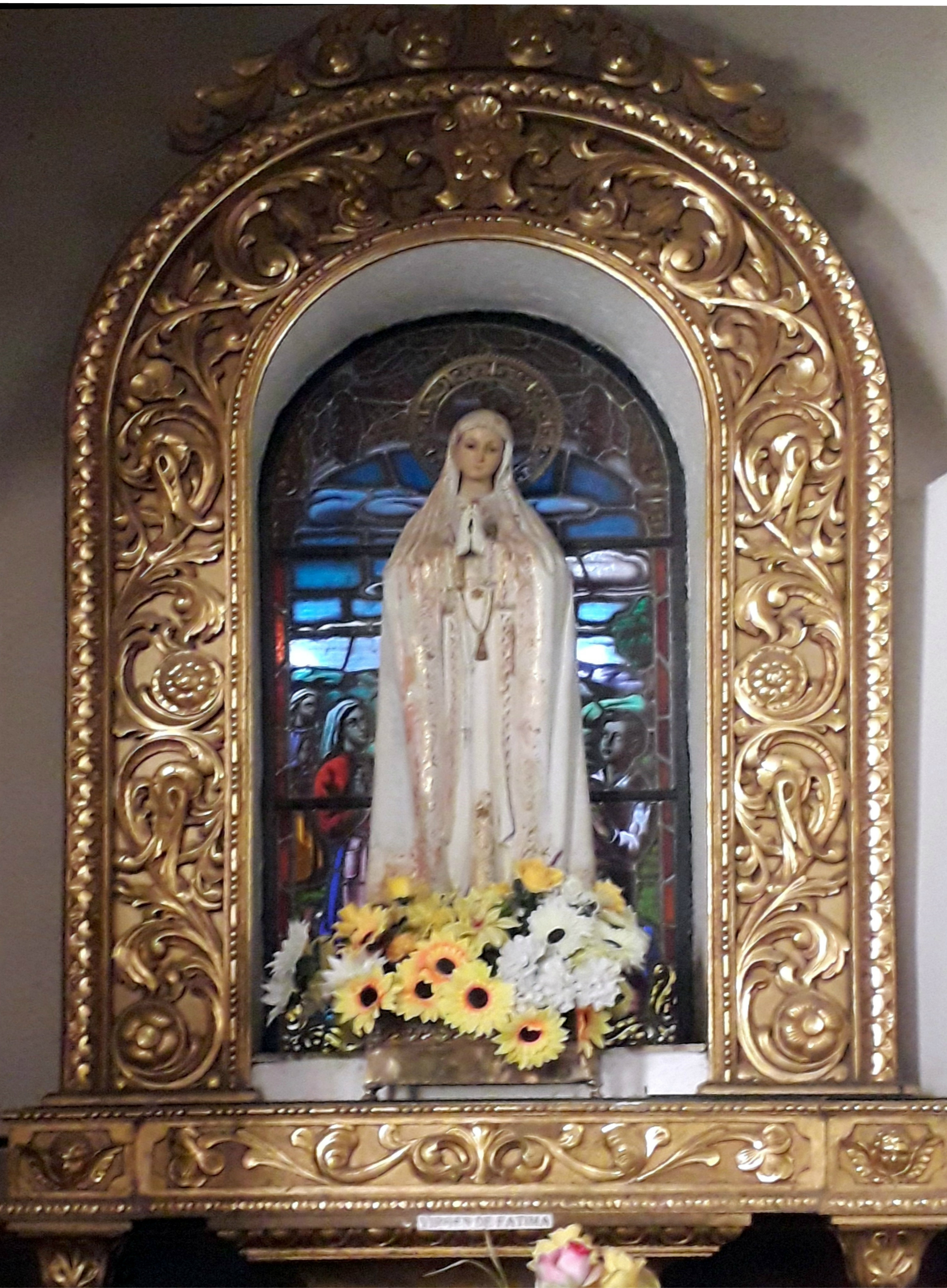 Imagen de Nuestra Señora de Fátima en la capilla de dicha advocación mariana en la Parroquia de San José de Jatibonico y Arroyo Blanco en Cuba.